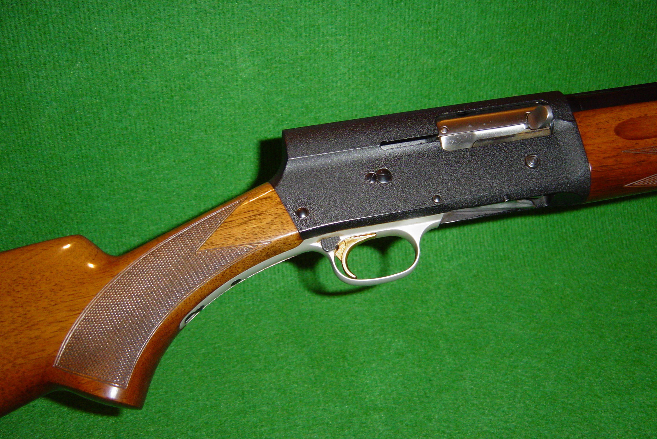 Fusil semi automatique Browning Auto 5 Calibre 16